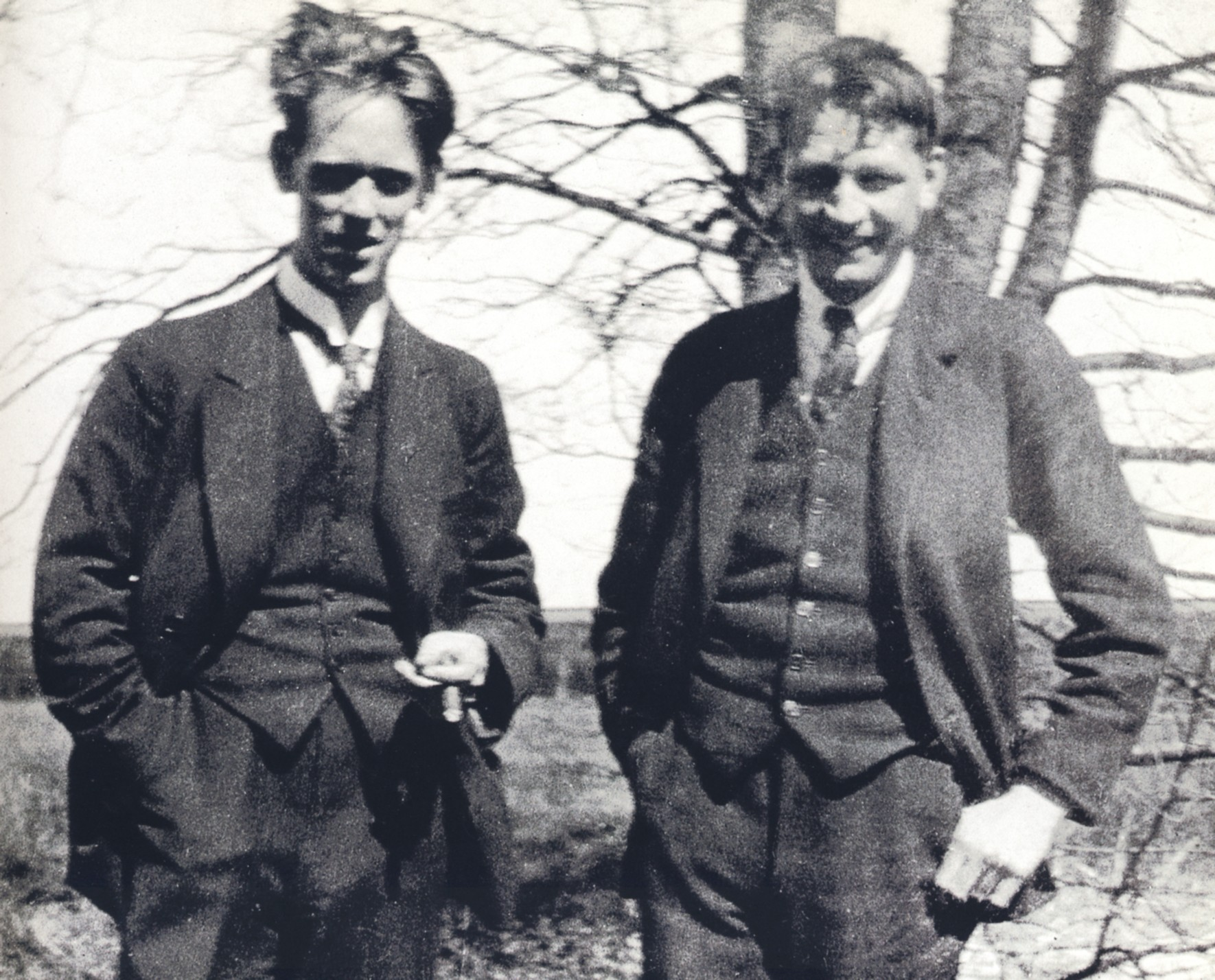 Peter Bang og Svend Olufsen foran den nye radiofabrik i Struer omkring 1930.